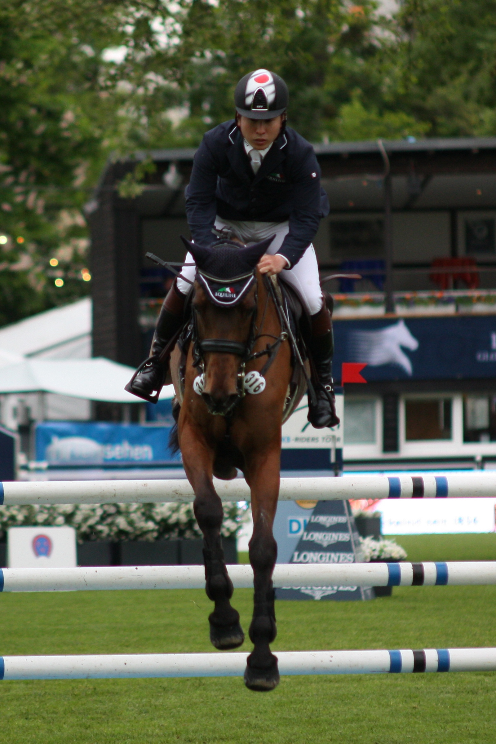 77. Internationanles Wiesbadener Pfingstunier 2013, CIC *** Vielseitigkeitsprüfung Springen, Kenki Sato auf Chippieh Personality rights warning Although this work is freely licensed or in the public domain, the person(s) shown may have rights that legally restrict certain re-uses unless those depicted consent to such uses. In these cases, a model release or other evidence of consent could protect you from infringement claims.